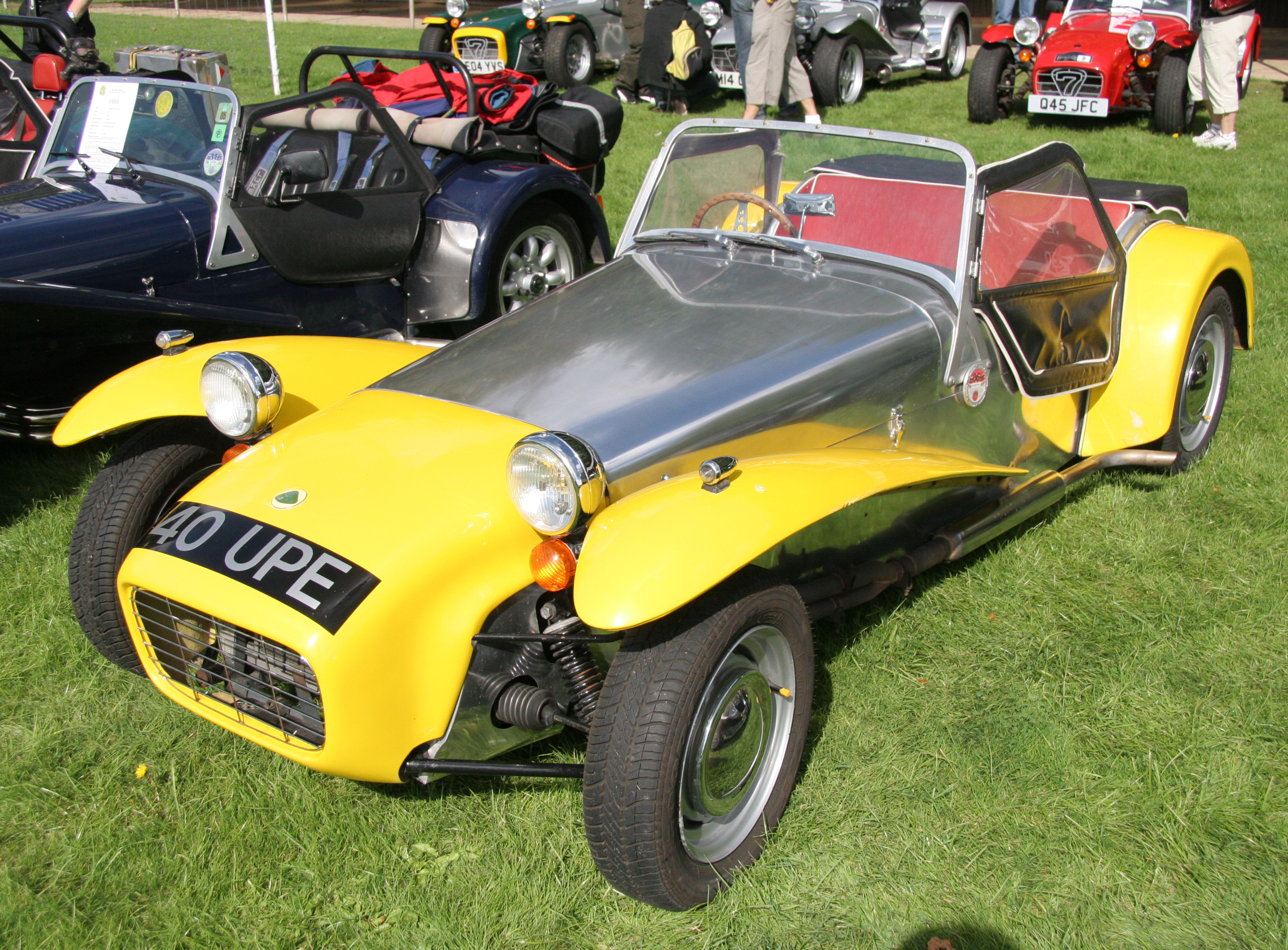 Lotus Super 7Lotus Super 7